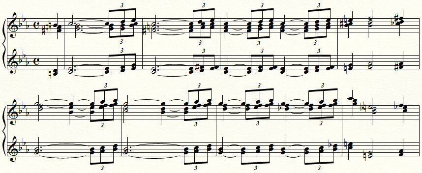 Блок-аккорды в аранжировке пьесы Г. Миллера "Moonlight Serenade" (начальный фрагмент)